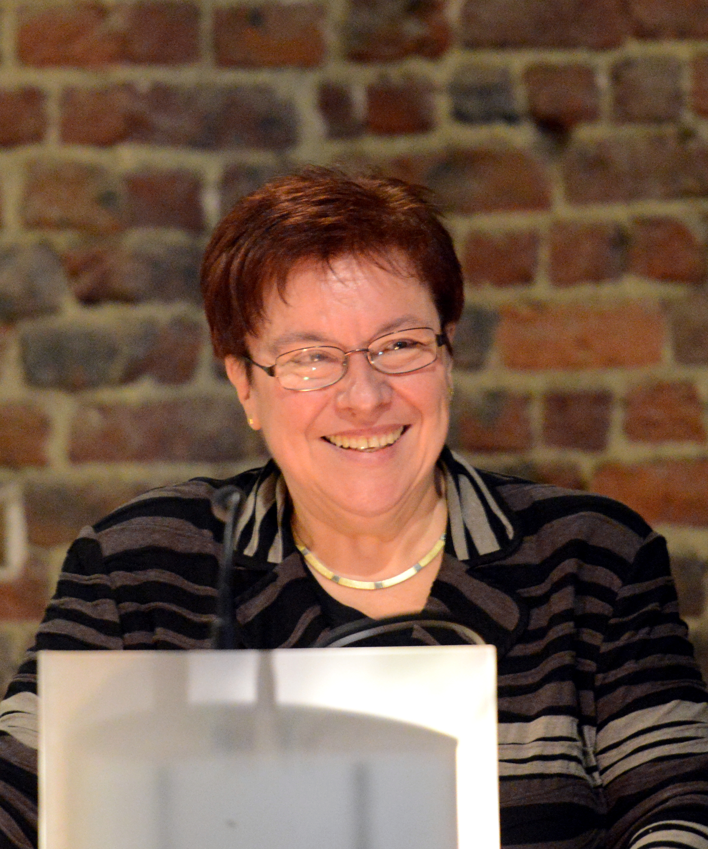 D'Germaine Goetzinger bei der Presentatioun vun hirem Buch Wuertwiertlech. 57 Rieden, den 11. November 2013 am Waassertuerm + Pomhouse zu Diddeleng.